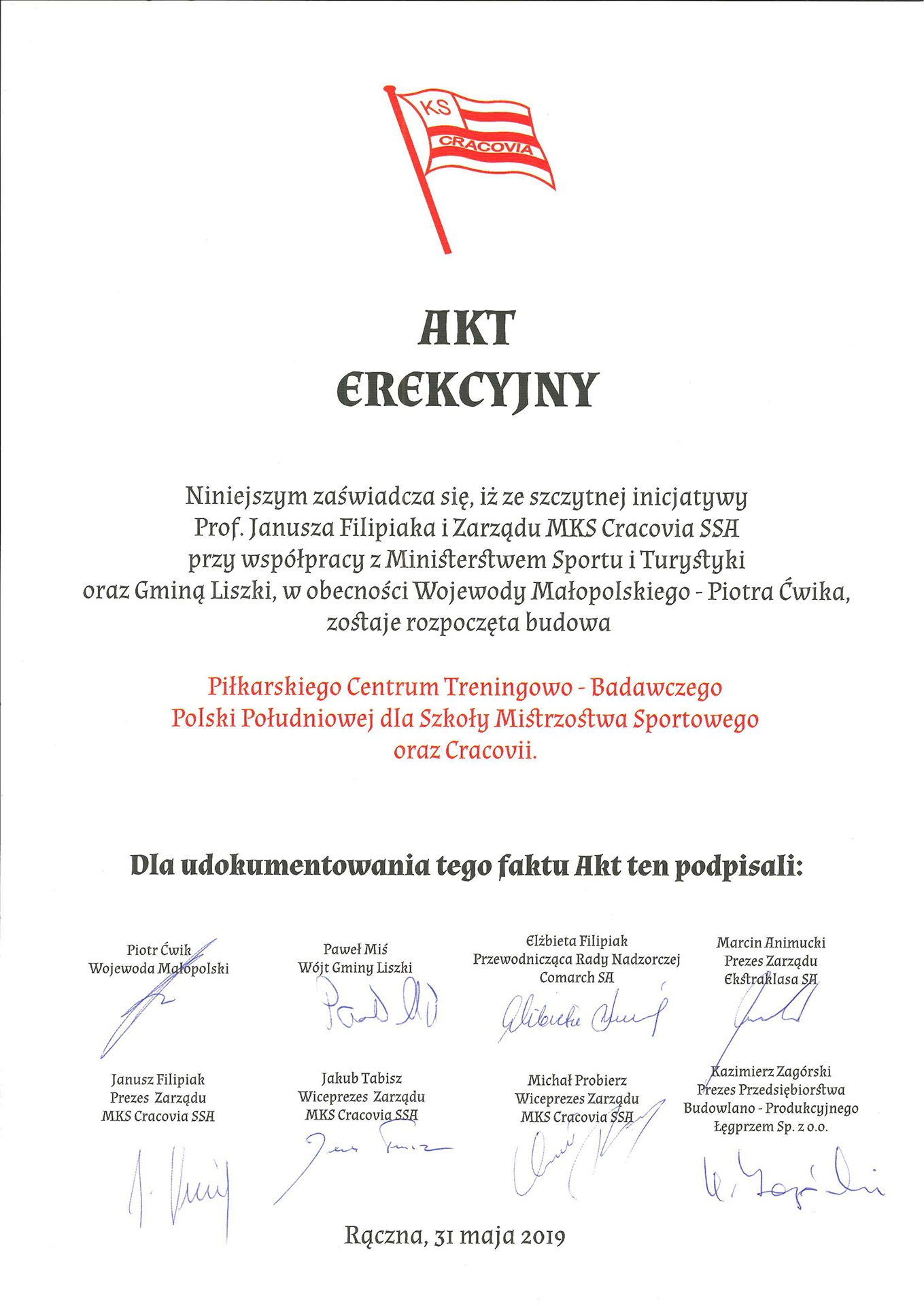 Podpisany Akt Erekcyjny rozpoczynający budowę Centrum Treningowego Cracovii w Rącznej